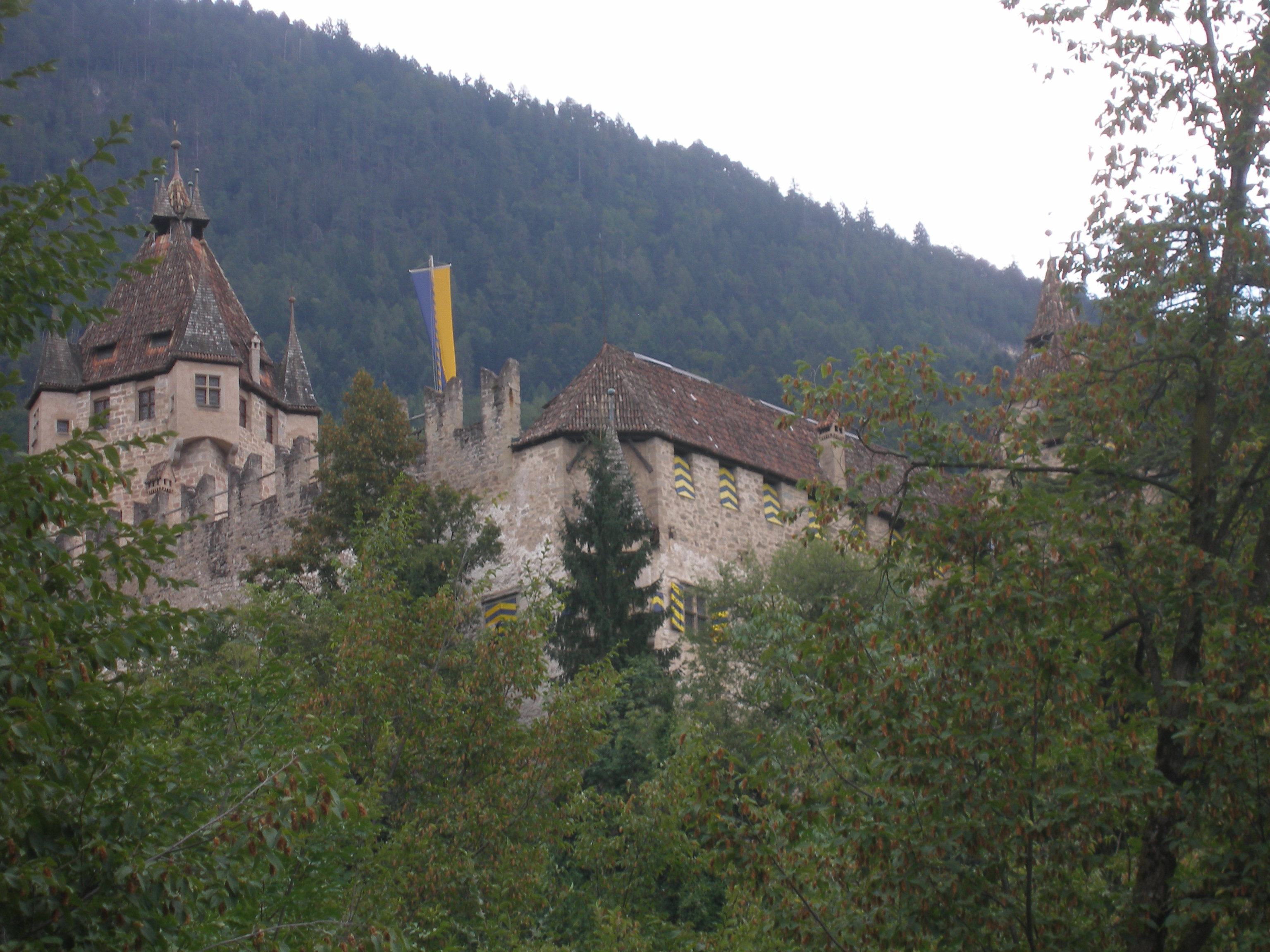 Schloss Enn bei Montan in Südtirol